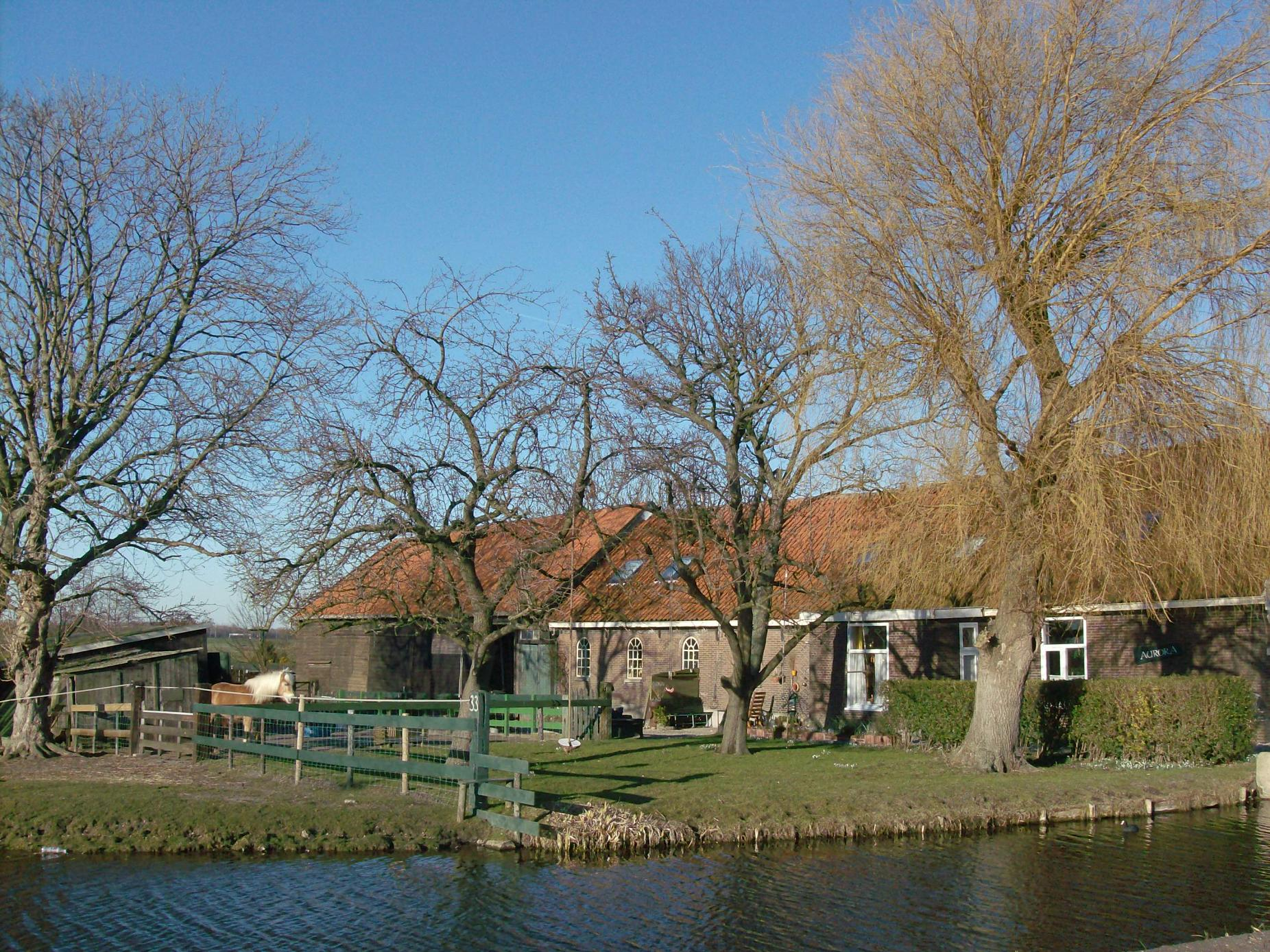 Farm in Wilsveen, Netherlands. Boerderij te Wilsveen (Leidschendam), Nederland